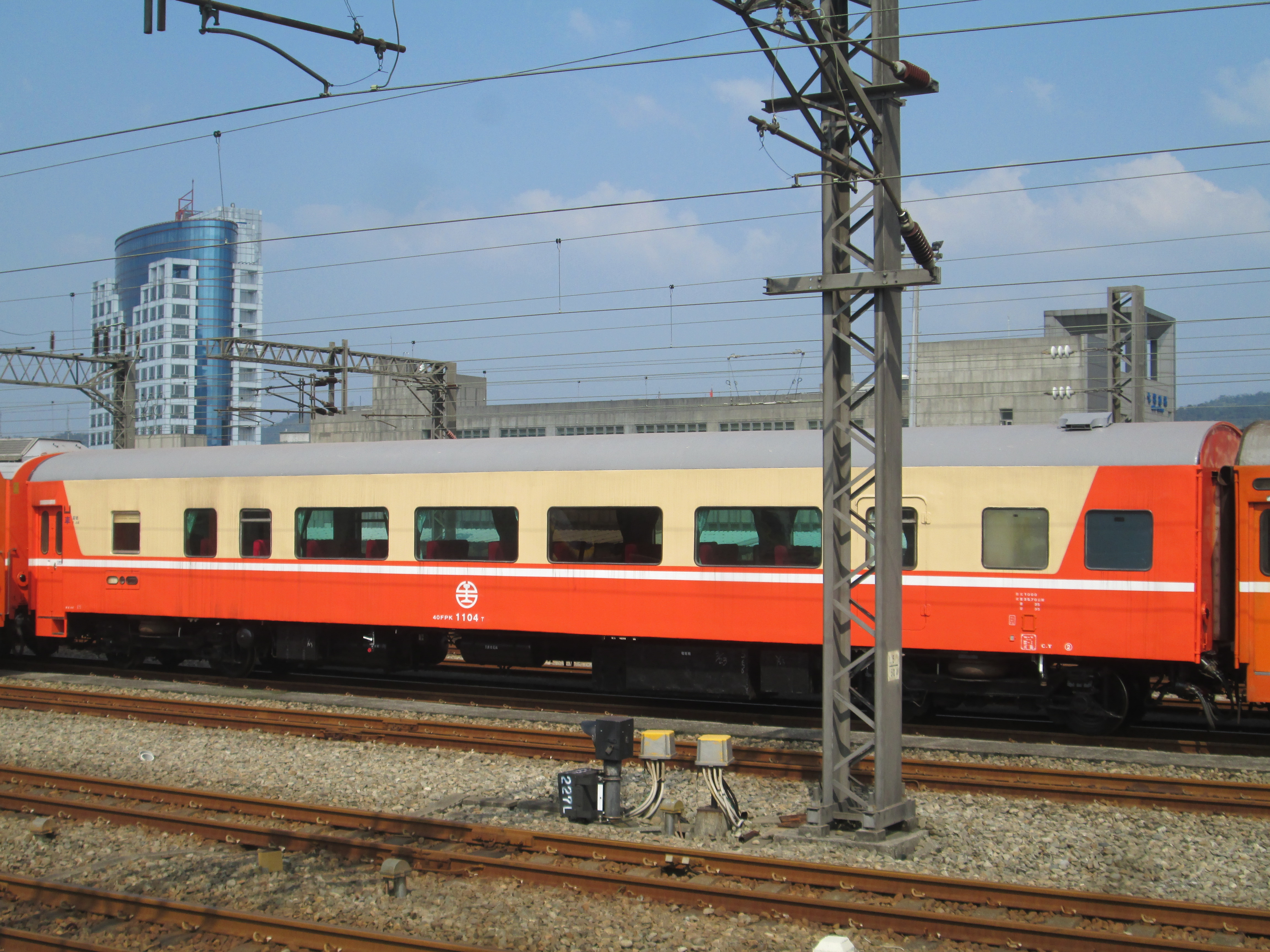 臺灣鐵路管理局莒光號客車40FPK1104T停靠七堵調車場。